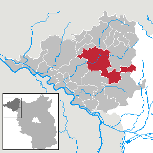 Groß Pankow (Prignitz) in Brandenburg (Country) - District Prignitz